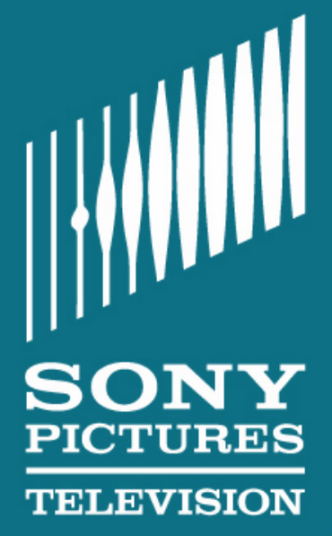 Logo de Sony Pictures Television.